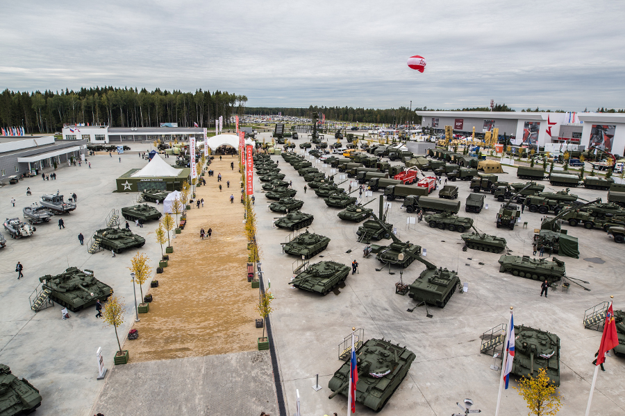 Второй день Международного военно-технического форума «Армия-2016». Московская область, парк «Патриот», 7 сентября 2016.